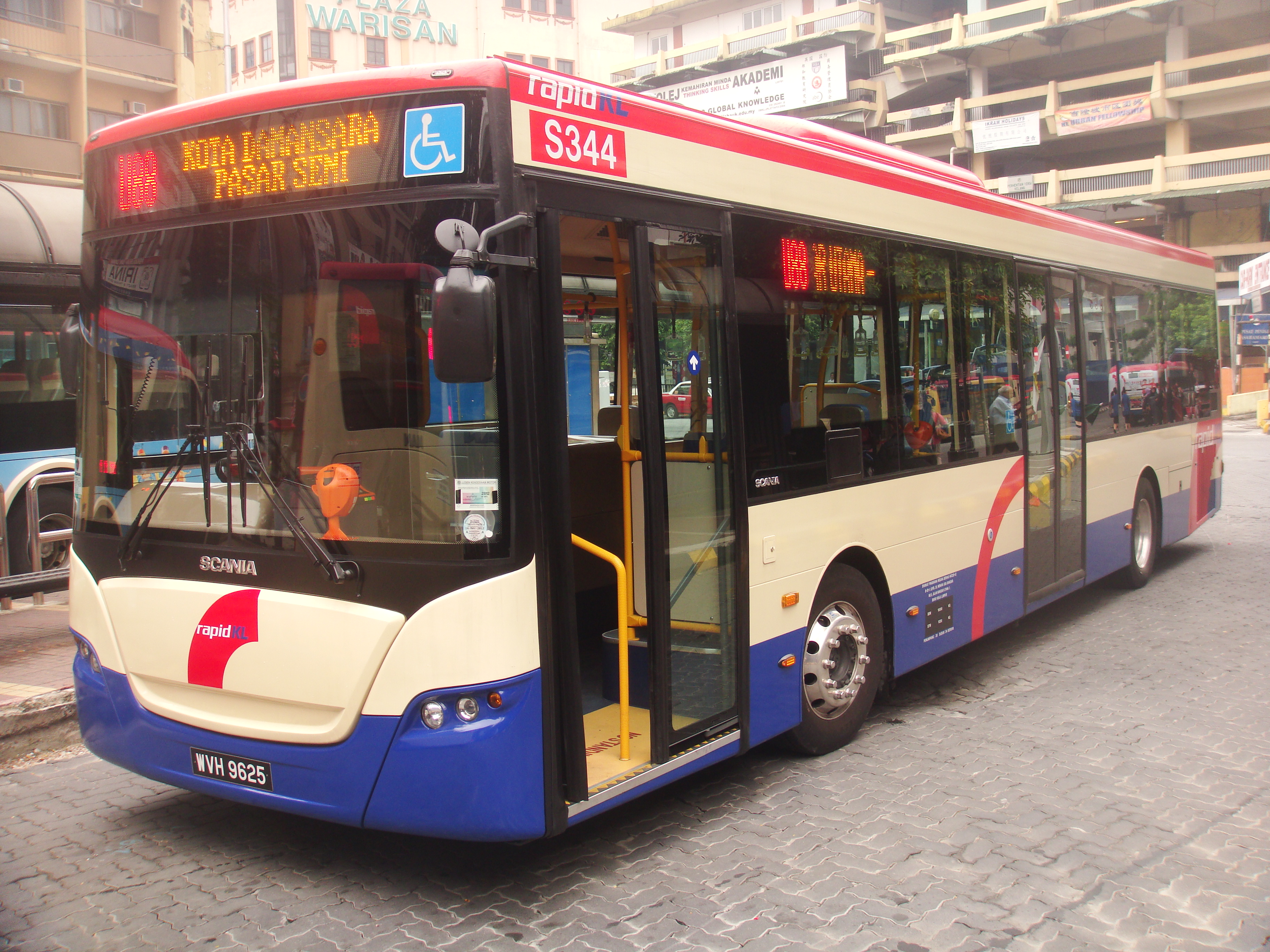 A Scania K270UB bus operated by RapidKL in Kuala Lumpur, Malaysia.